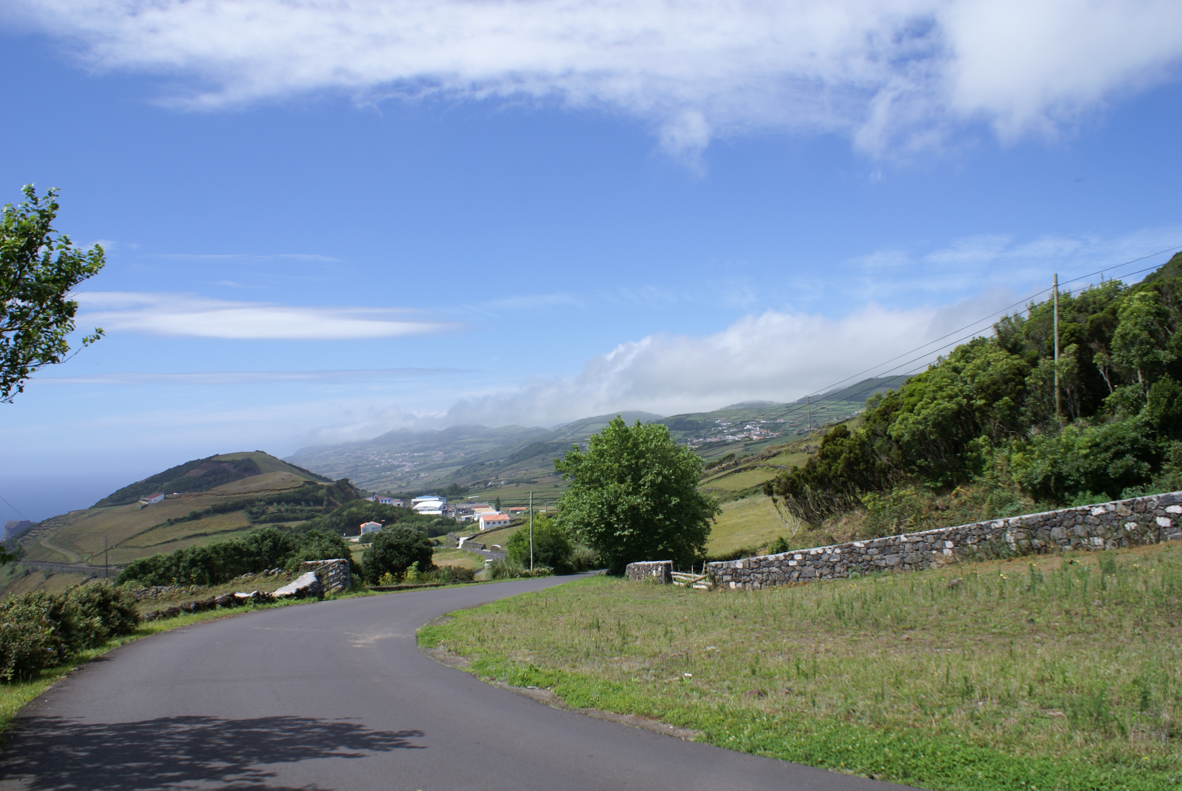 Paisagem visivel a caminho de Santo Amaro, Velas, ilha de São Jorge, Açores